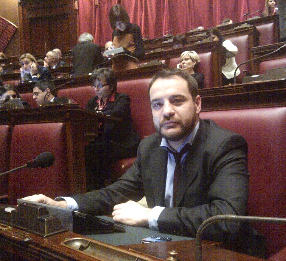 primi giorni in parlamento